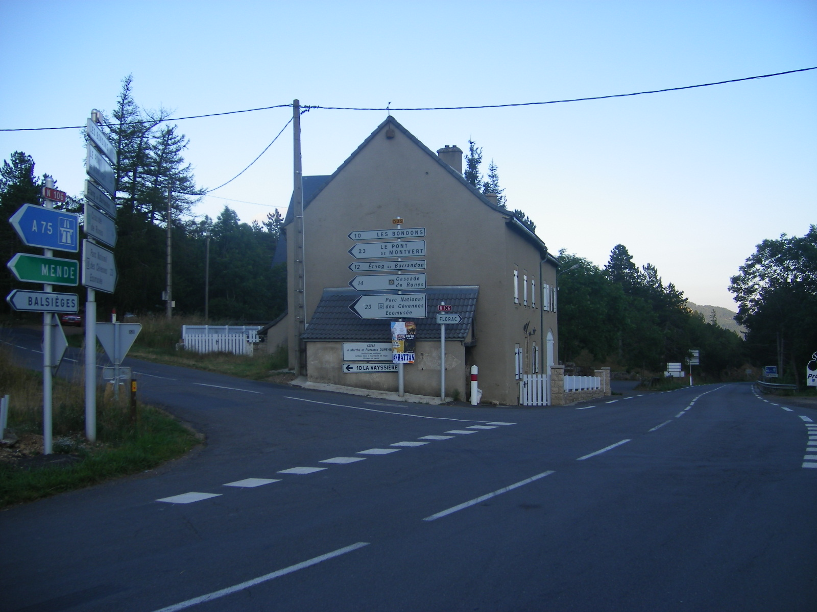 Col de Montmirat (1046 m)